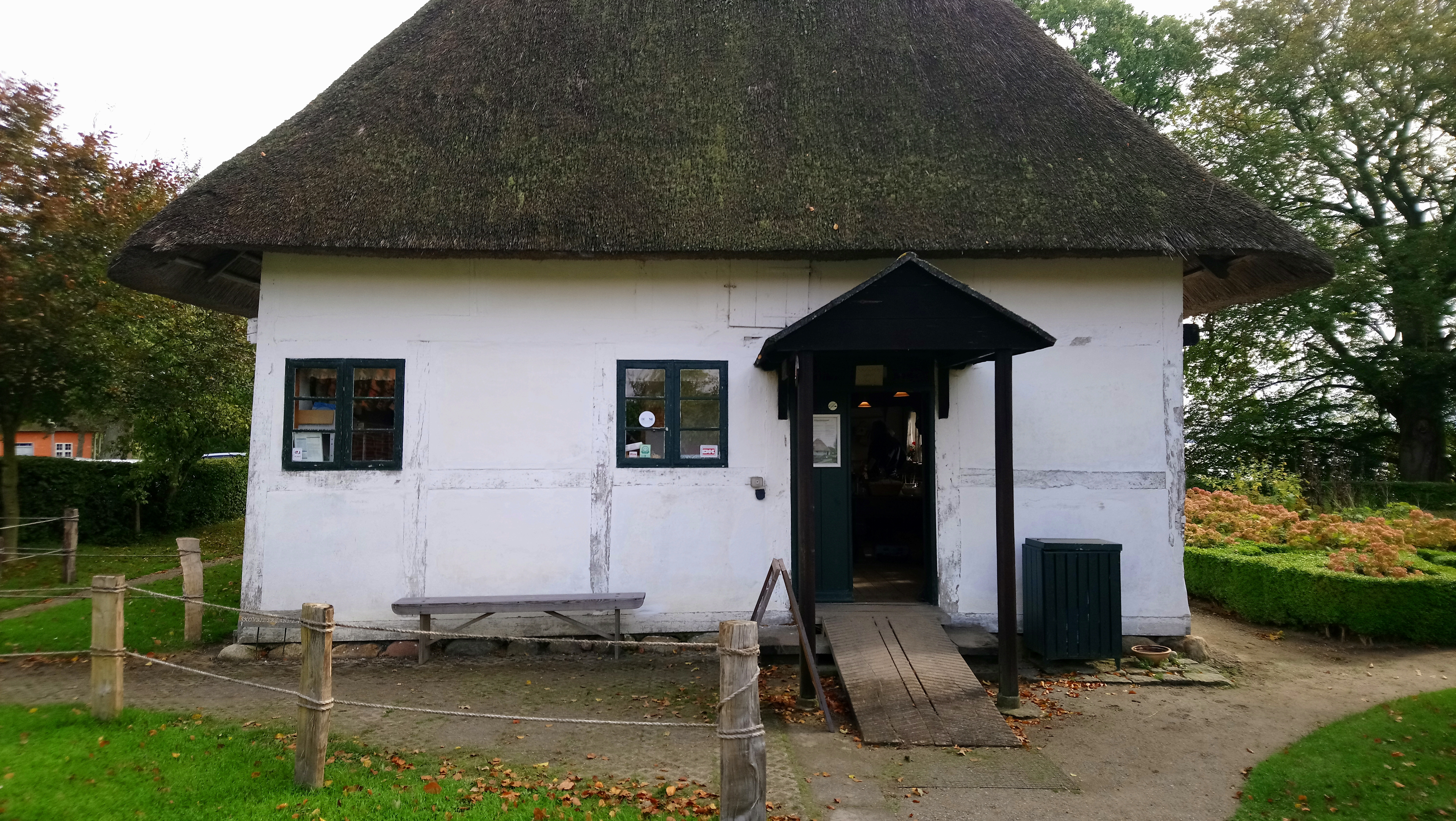 Indgang til museet. Fra slutningen af 1650'erne, og kom til museet i 1924.